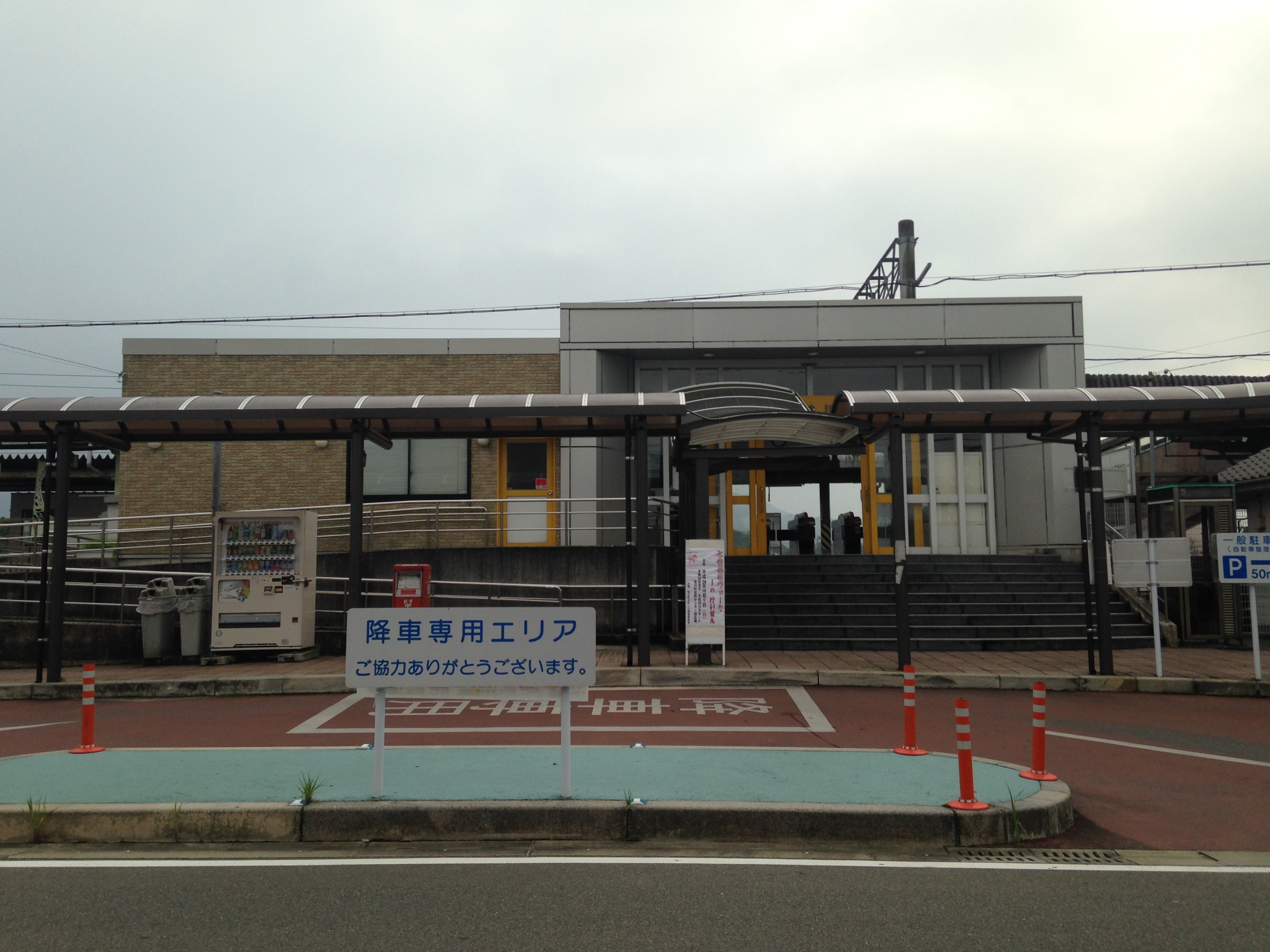 桂川駅の遠景